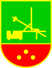 Wappen von Odranci Slowenien